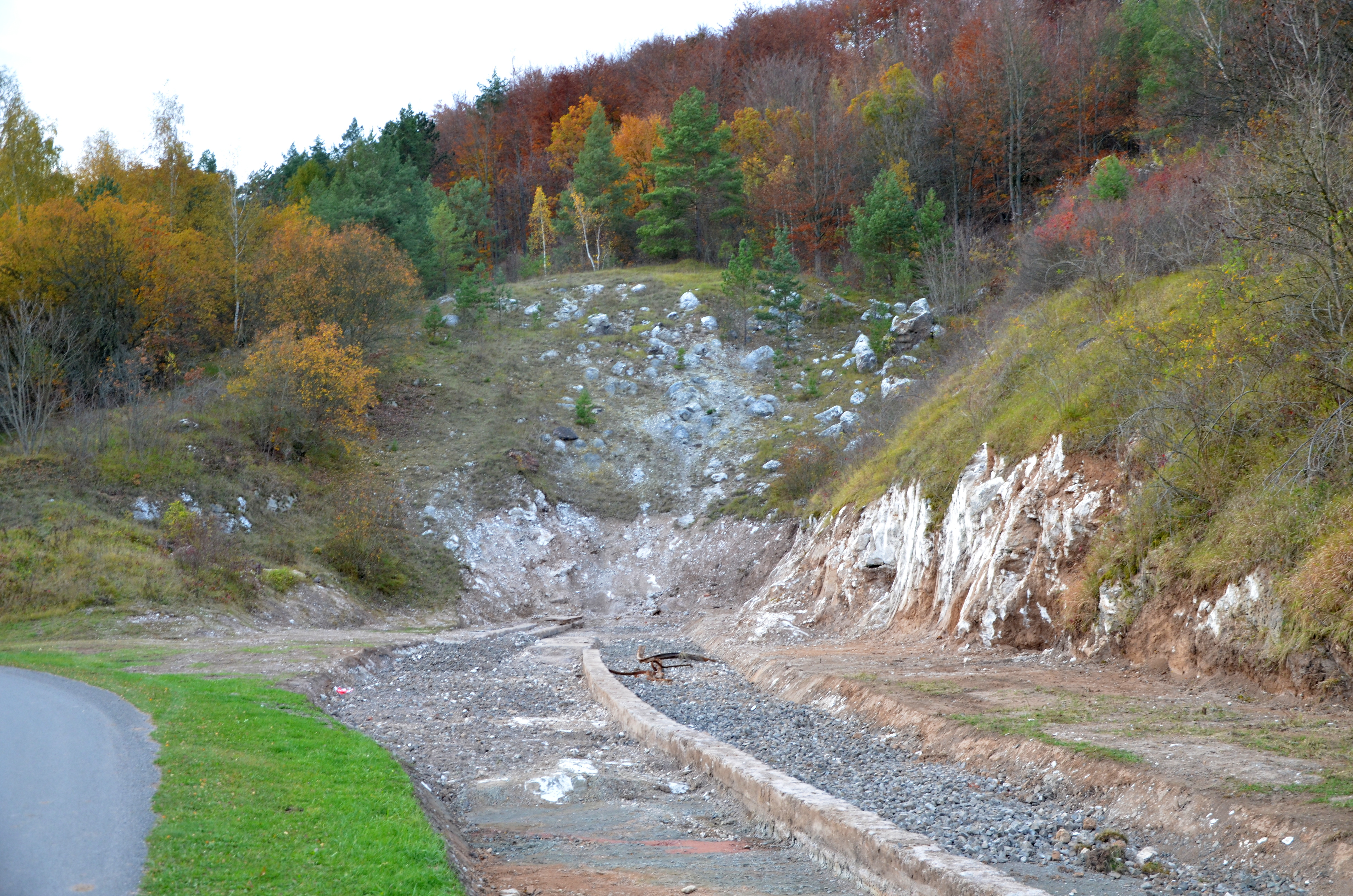 KZ-Dora Mittelbau, 1947 gesprengter Stolleneingang A.